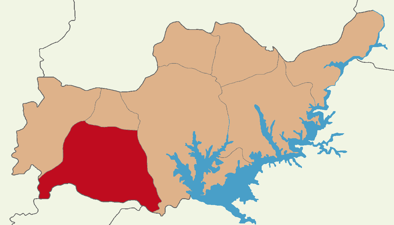 Besni ilçesinin konumu